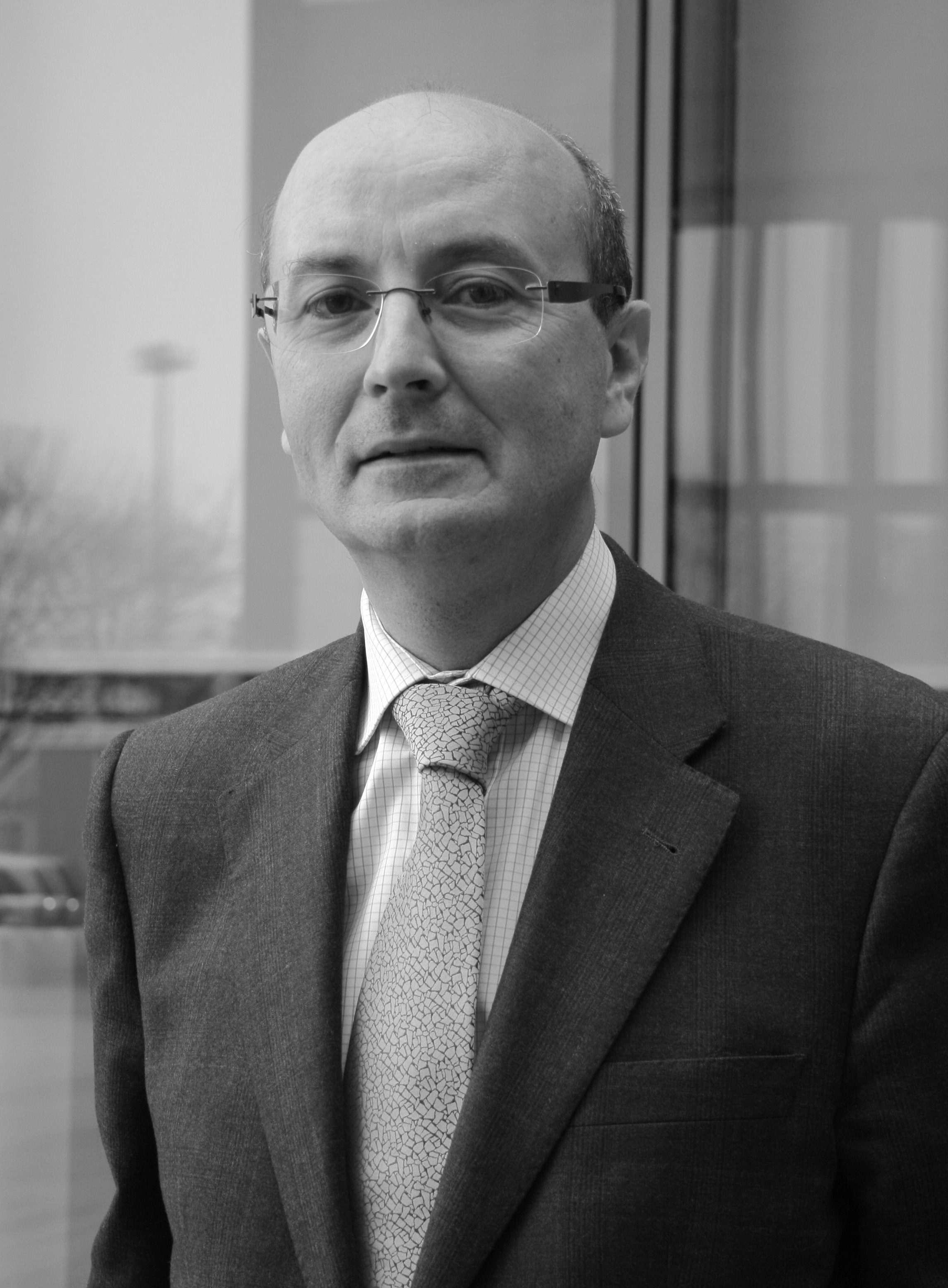 Benoit Pellistrandi né en 1966 est un historien français.